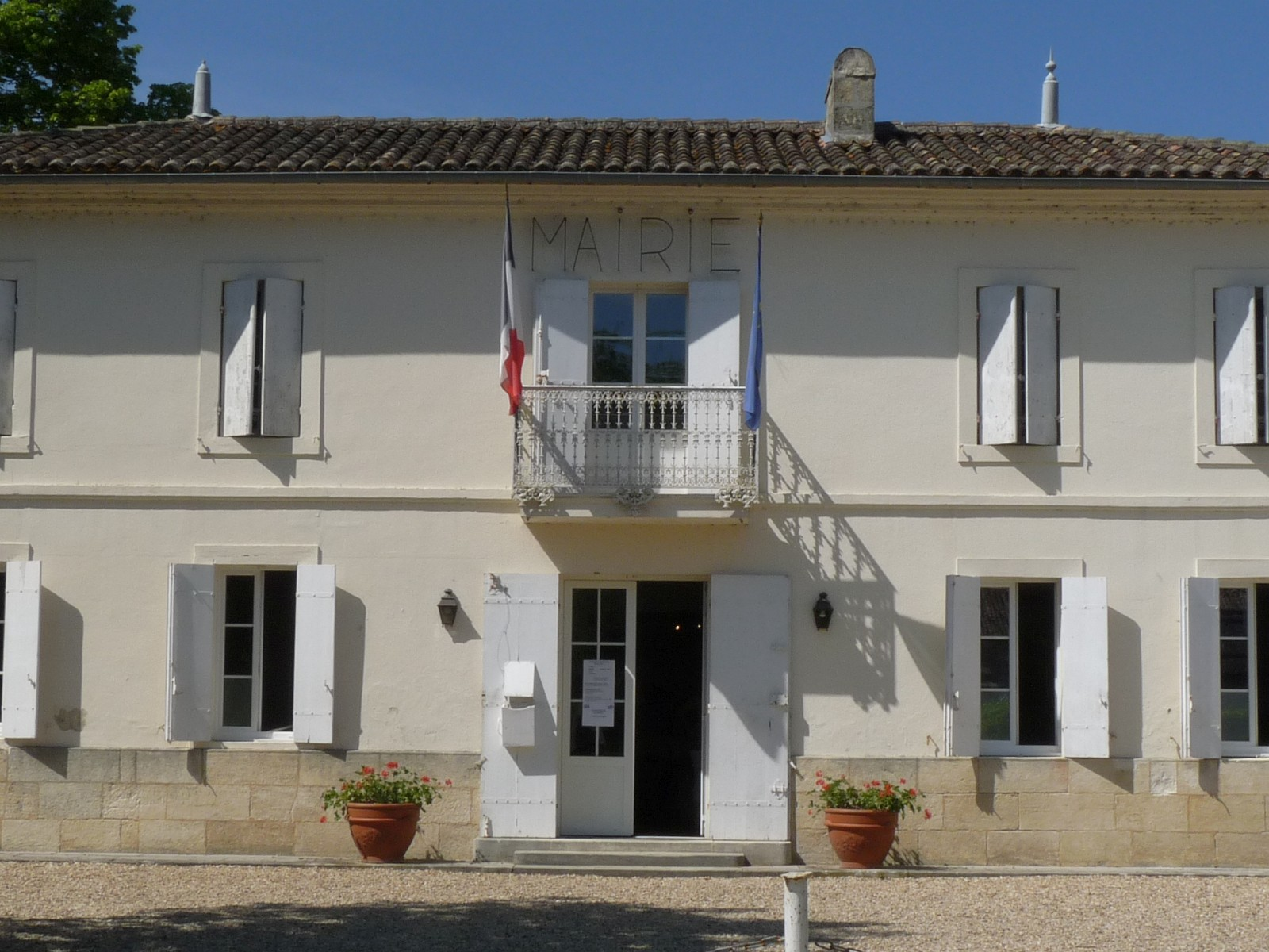 Mairie de Savignac-de-l'Isle, Gironde, France